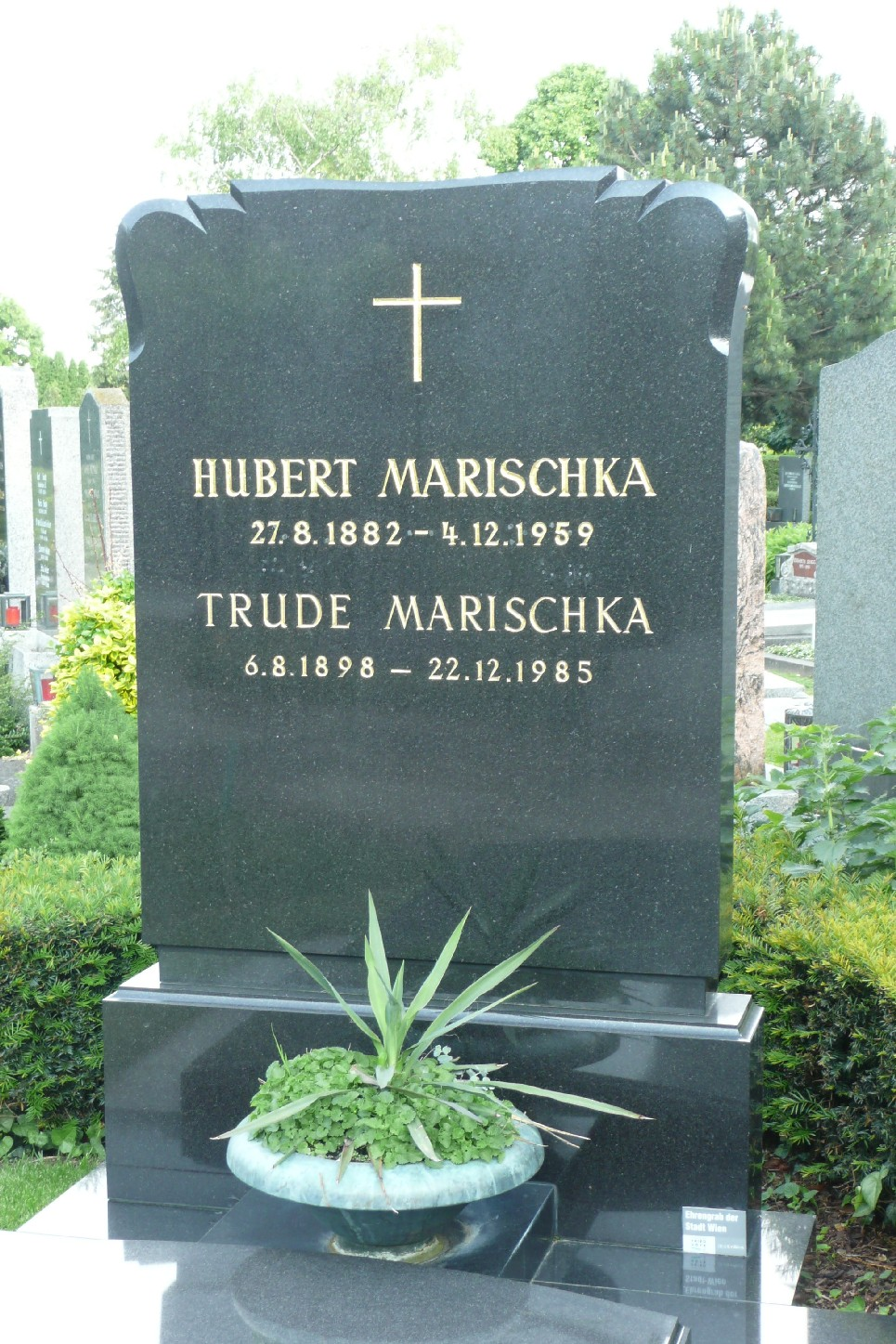 Grabstätte Hubert & Trude Marischkas auf dem Friedhof Hietzing